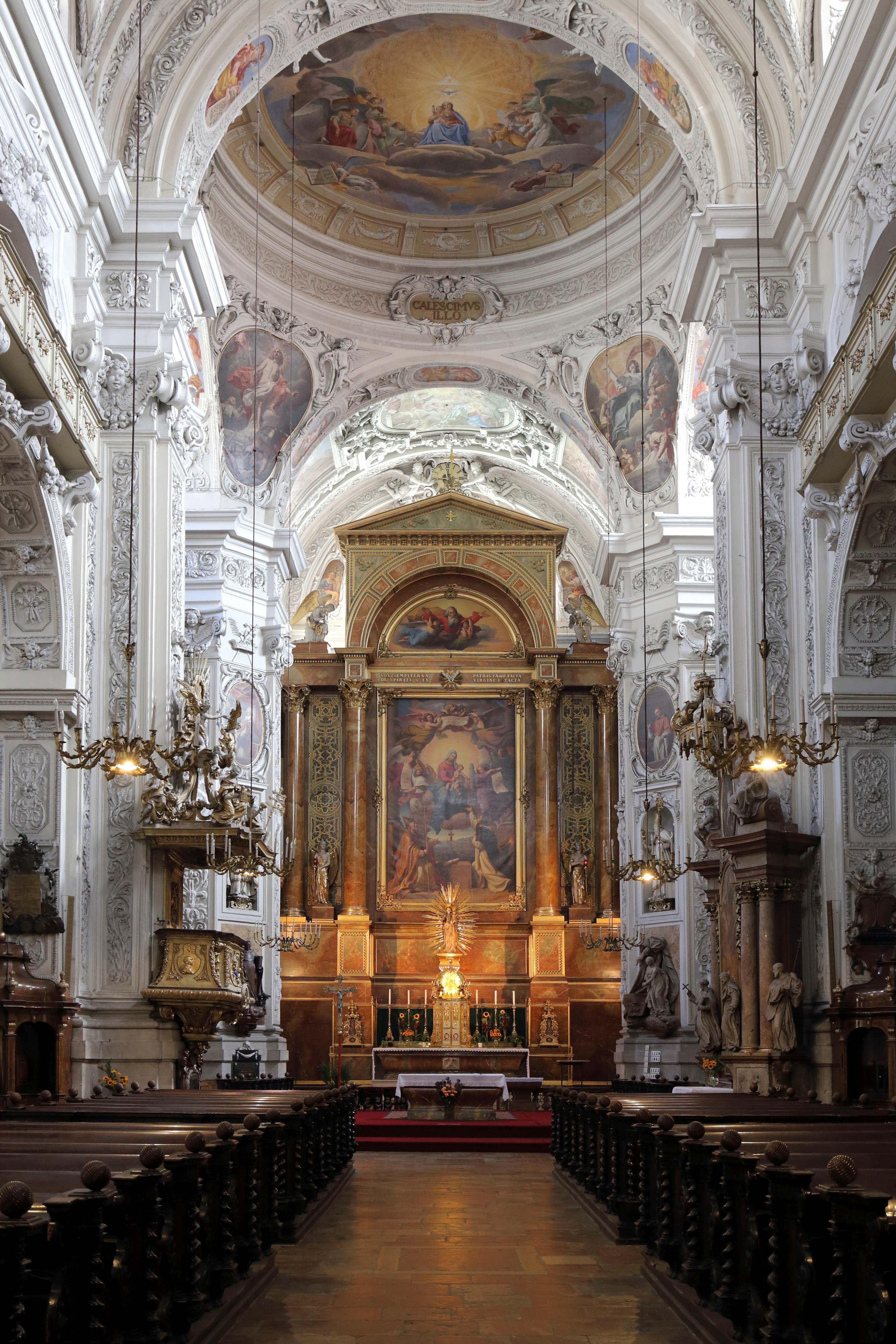 Hochaltar der Dominikanerkirche im 1. Wiener Gemeindebezirk Innere Stadt.